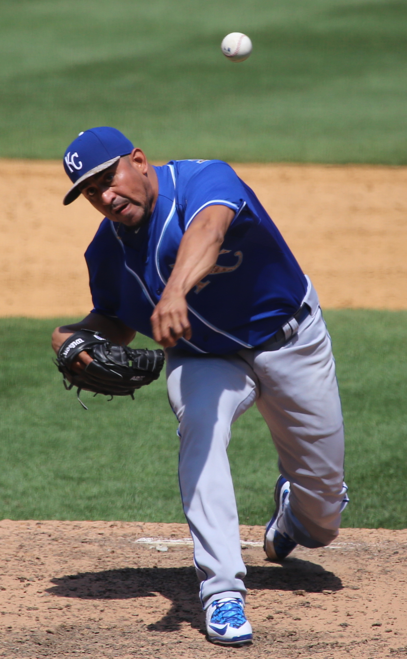 Franklin Morales